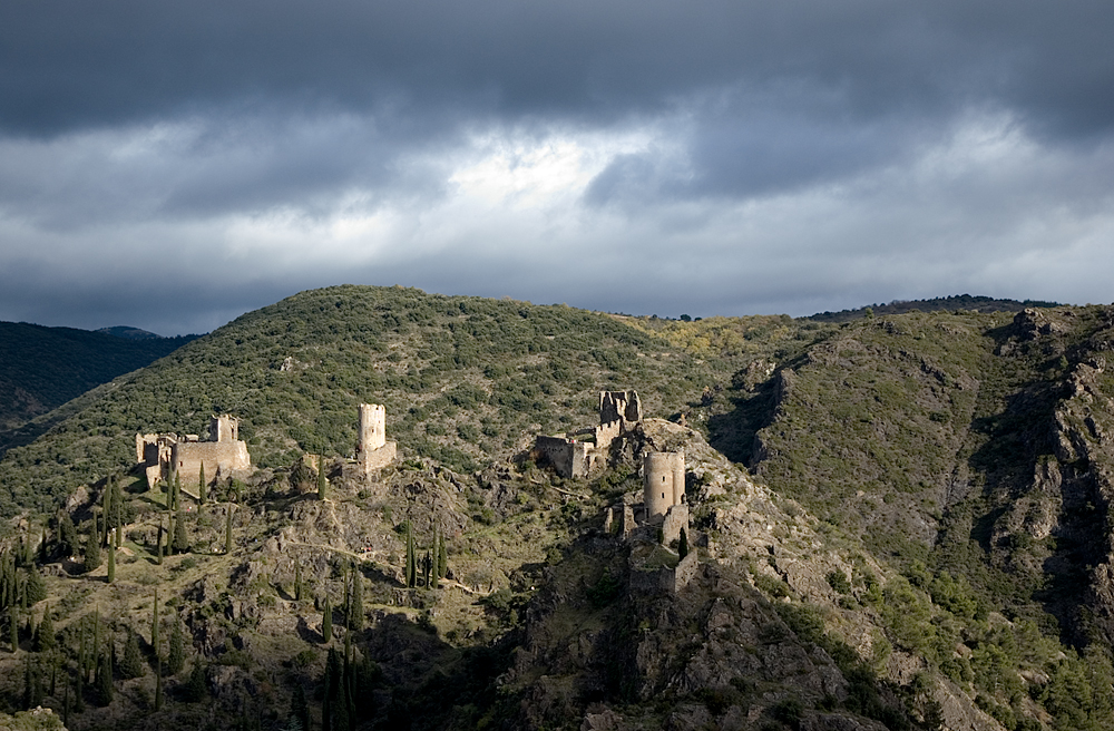 Castillos de Lastours (Francia)